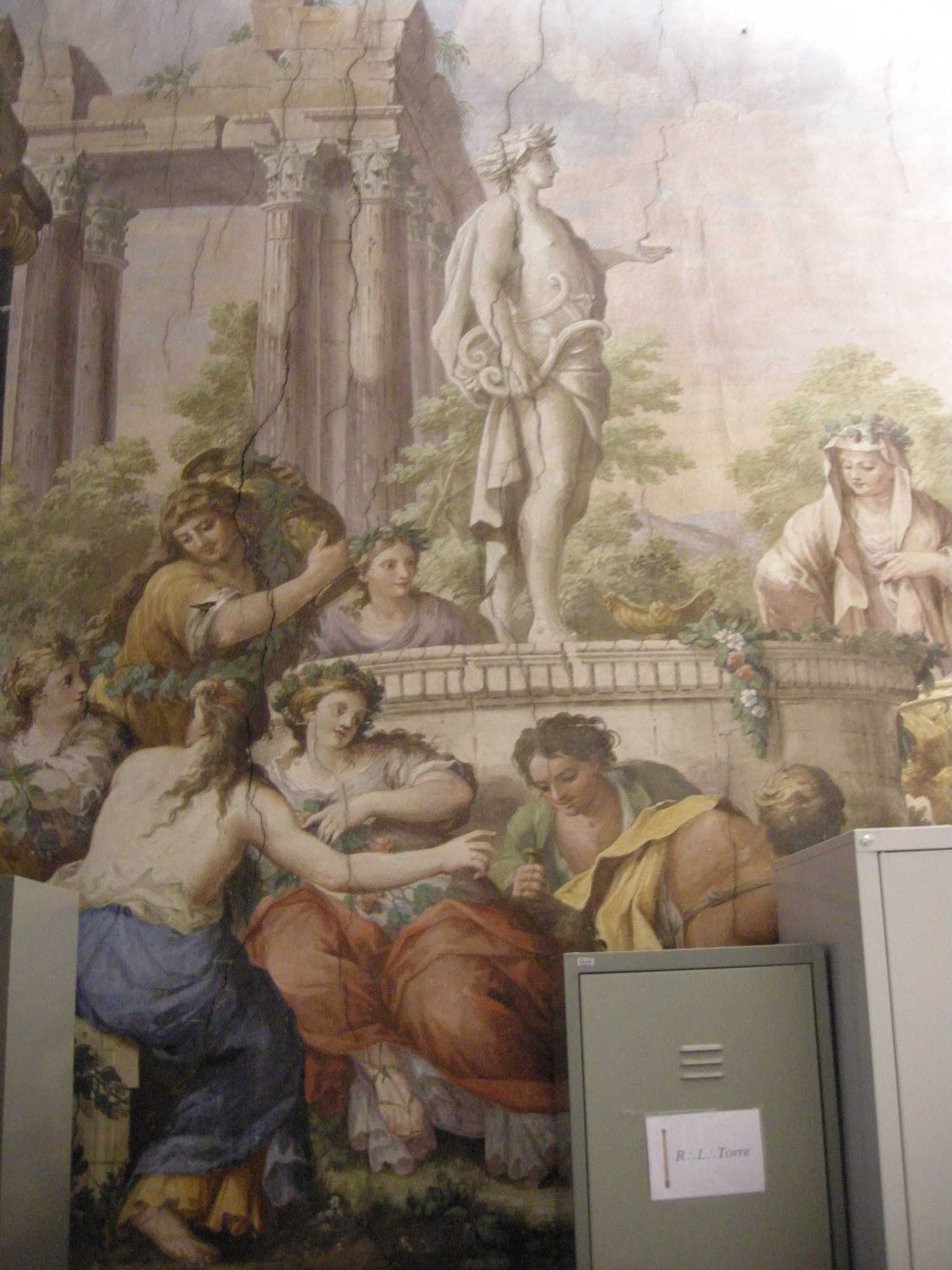 Palazzo Roffia, saletta di andromaca 03.1